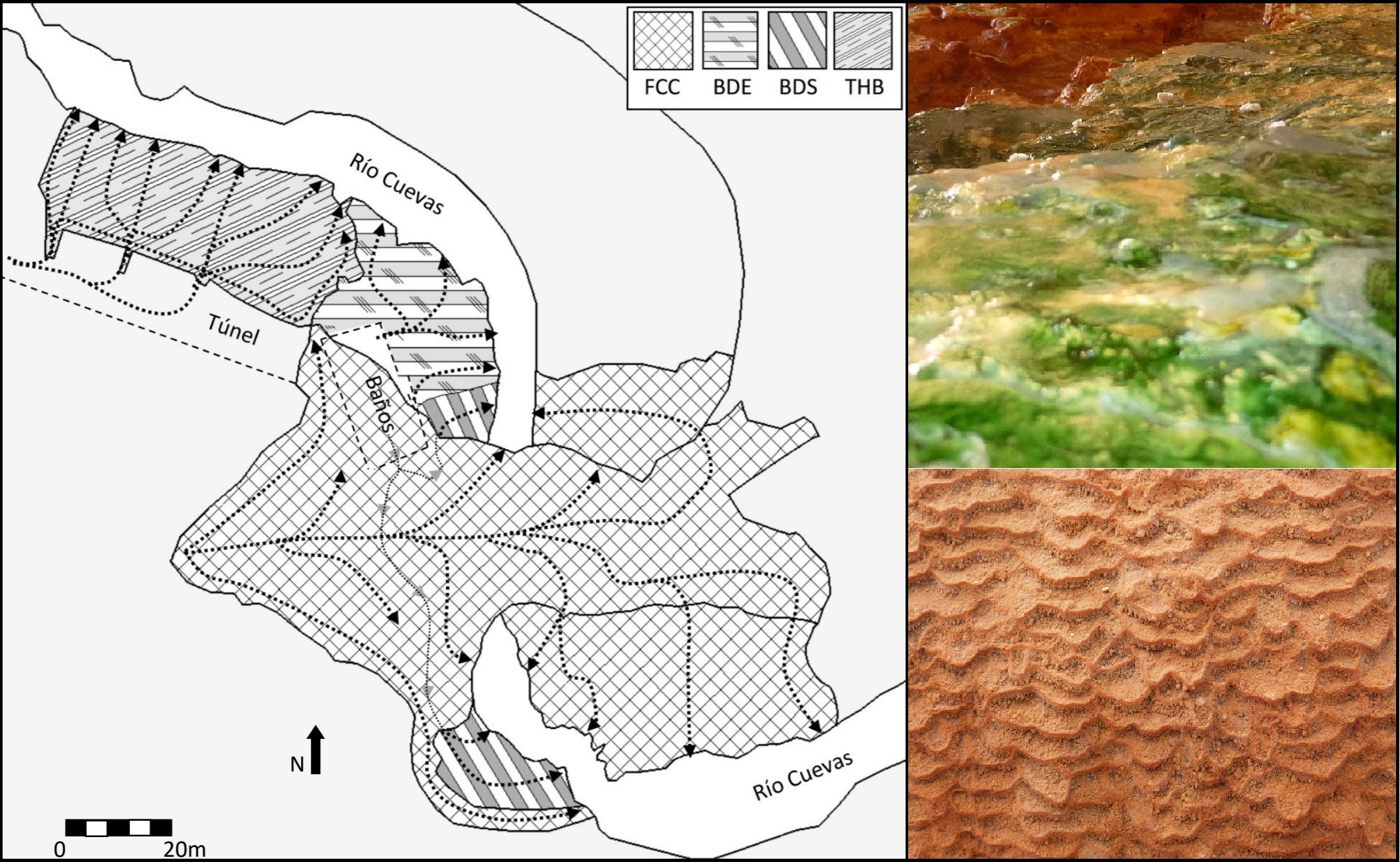 Fuentes termales de Puente del Inca